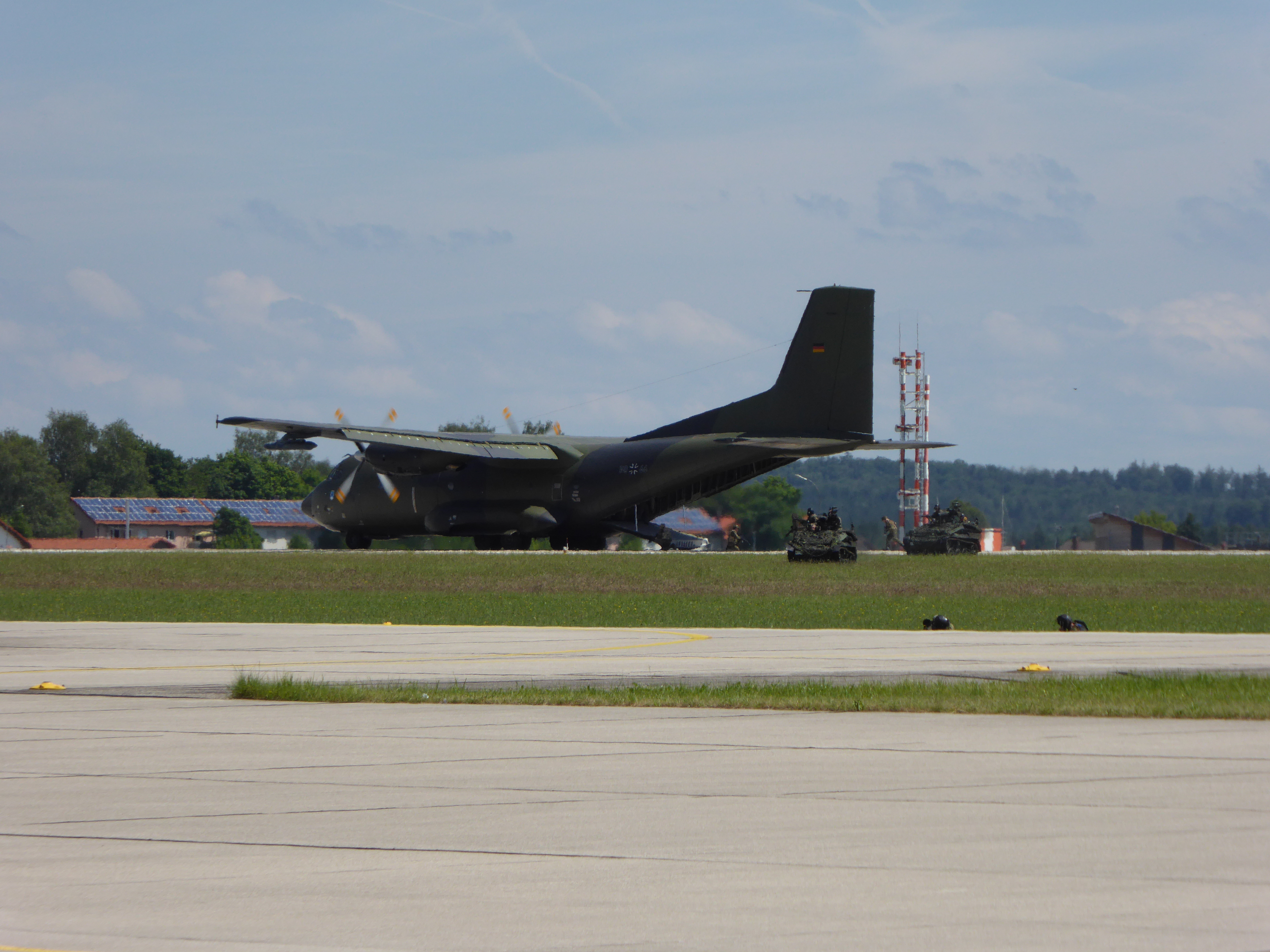 Absetzen von zwei Wiesel durch ein Transportflugzeug vom Typ C-160 Transall auf dem Fliegerhorst Penzing 2017 am Tag der Bundeswehr